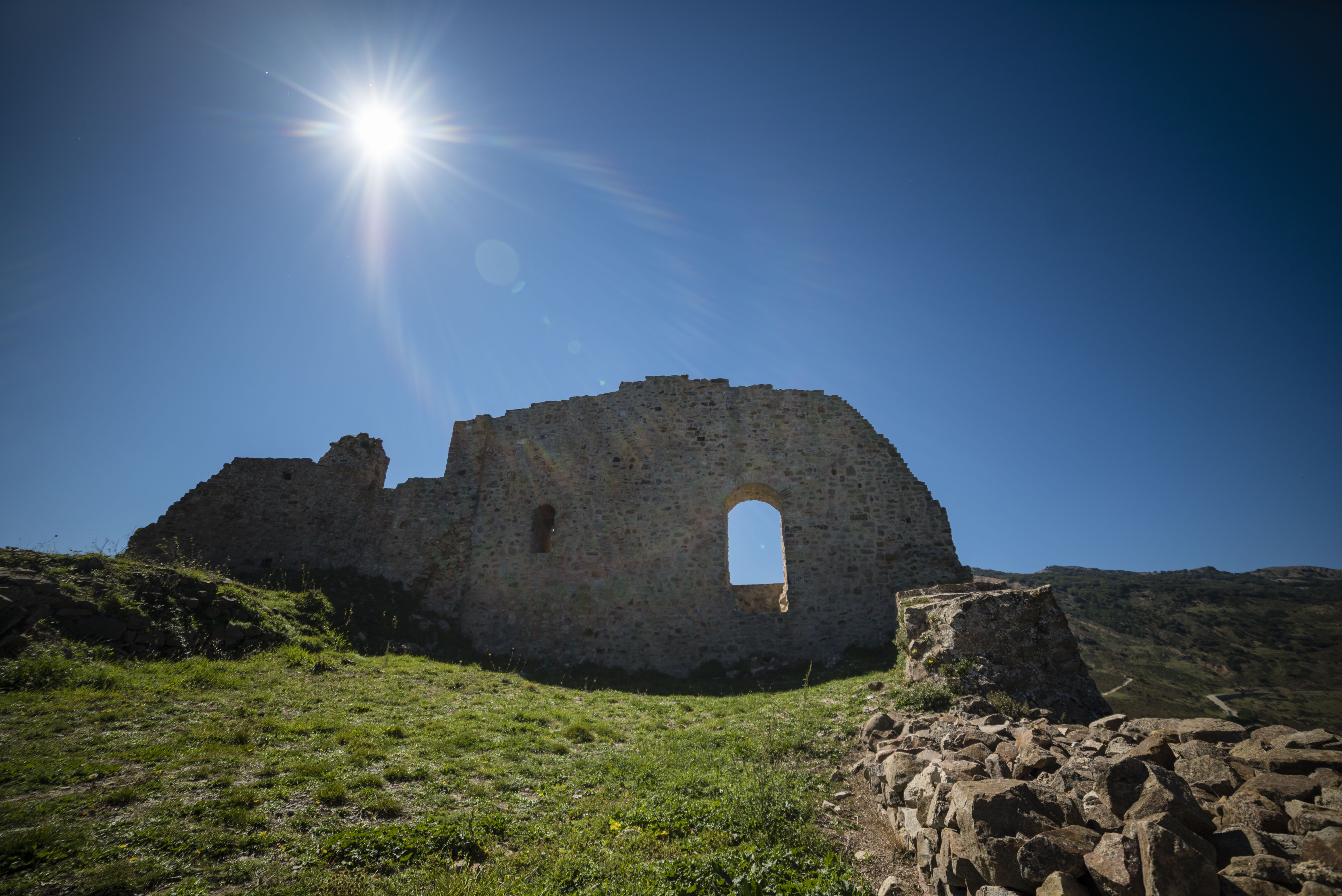 castello dei Ventimiglia This is a photo of a monument which is part of cultural heritage of Italy.